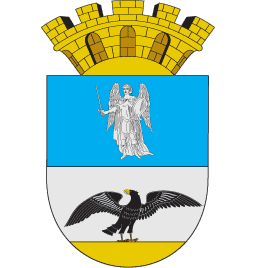 Герб Таращанського району